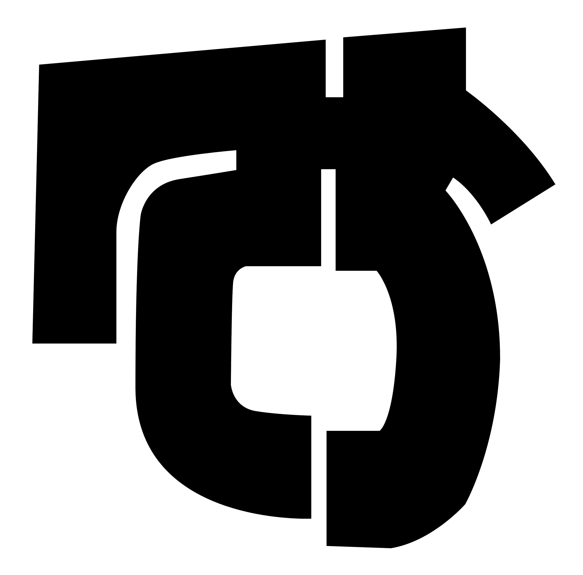 Amnistiaren Aldeko Batzordeetako ikurra, Eduardo Chillidak diseinatutakoa